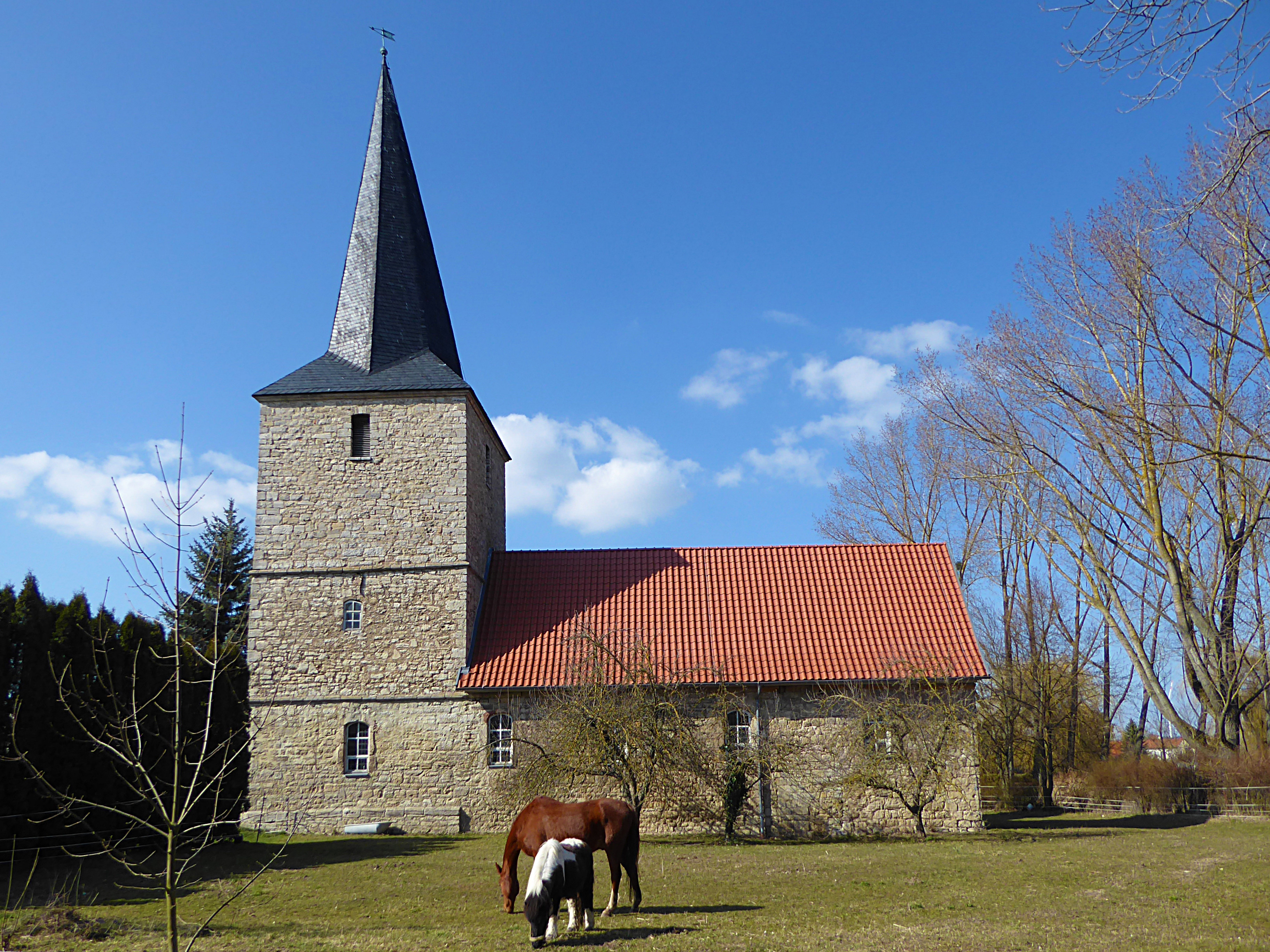 Dorfkirche St. Petrus und Paulus (Großberndten) von Süden